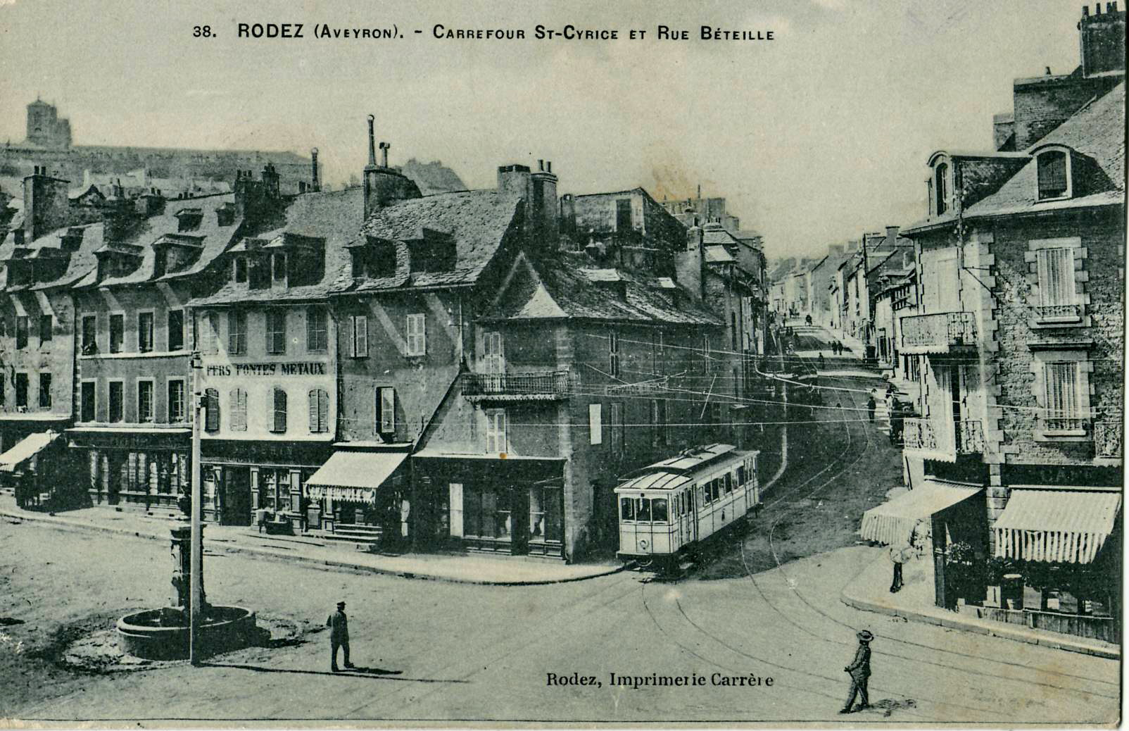 Carte postale ancienne éditée par l'imprimerie Carrère à Rodez, n°38 :RODEZ - Carrefour St-Cyrice et rue Réteille